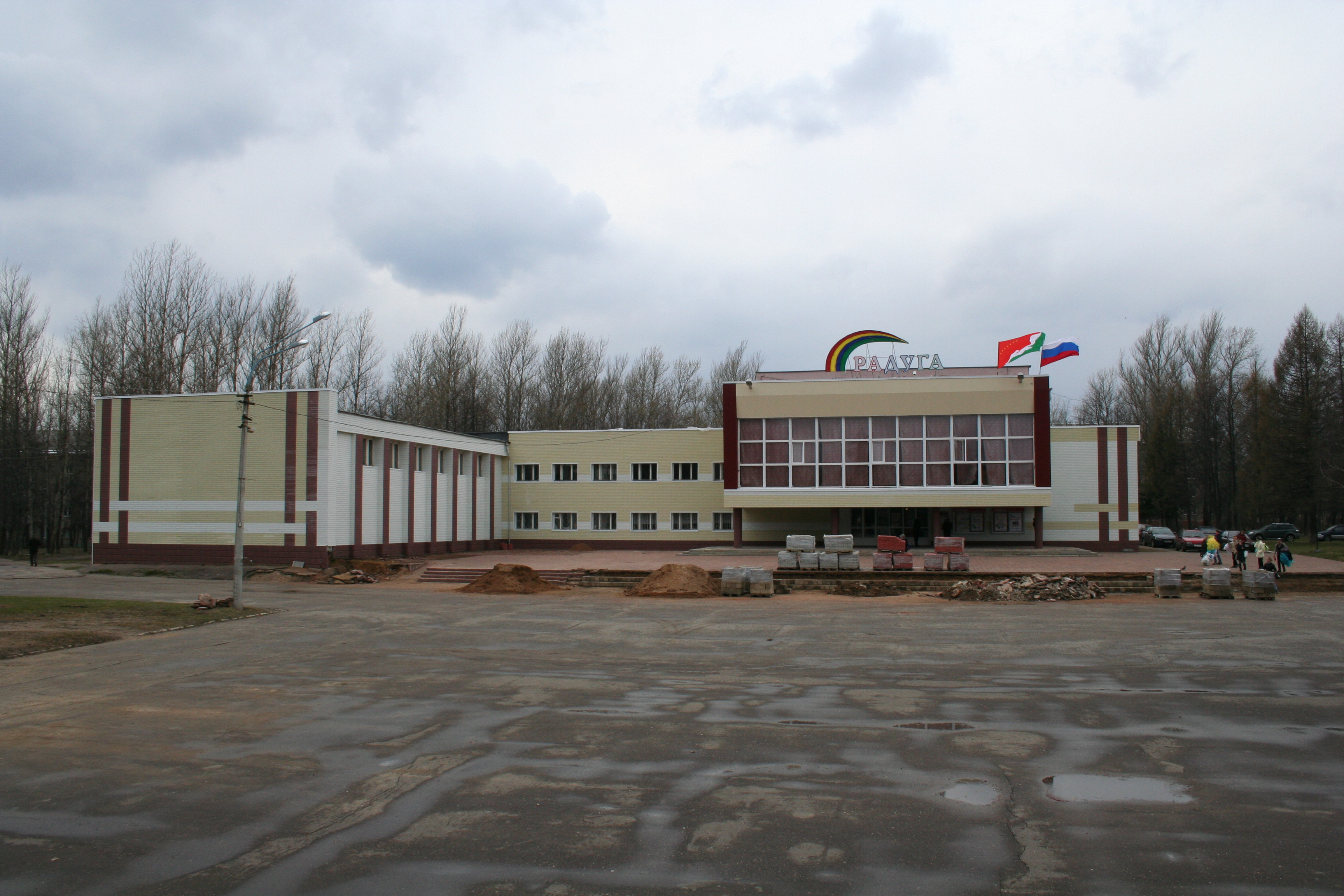 Kulturhaus „Raduga“ in Krasnosawodsk, Oblast Moskau, Russland.